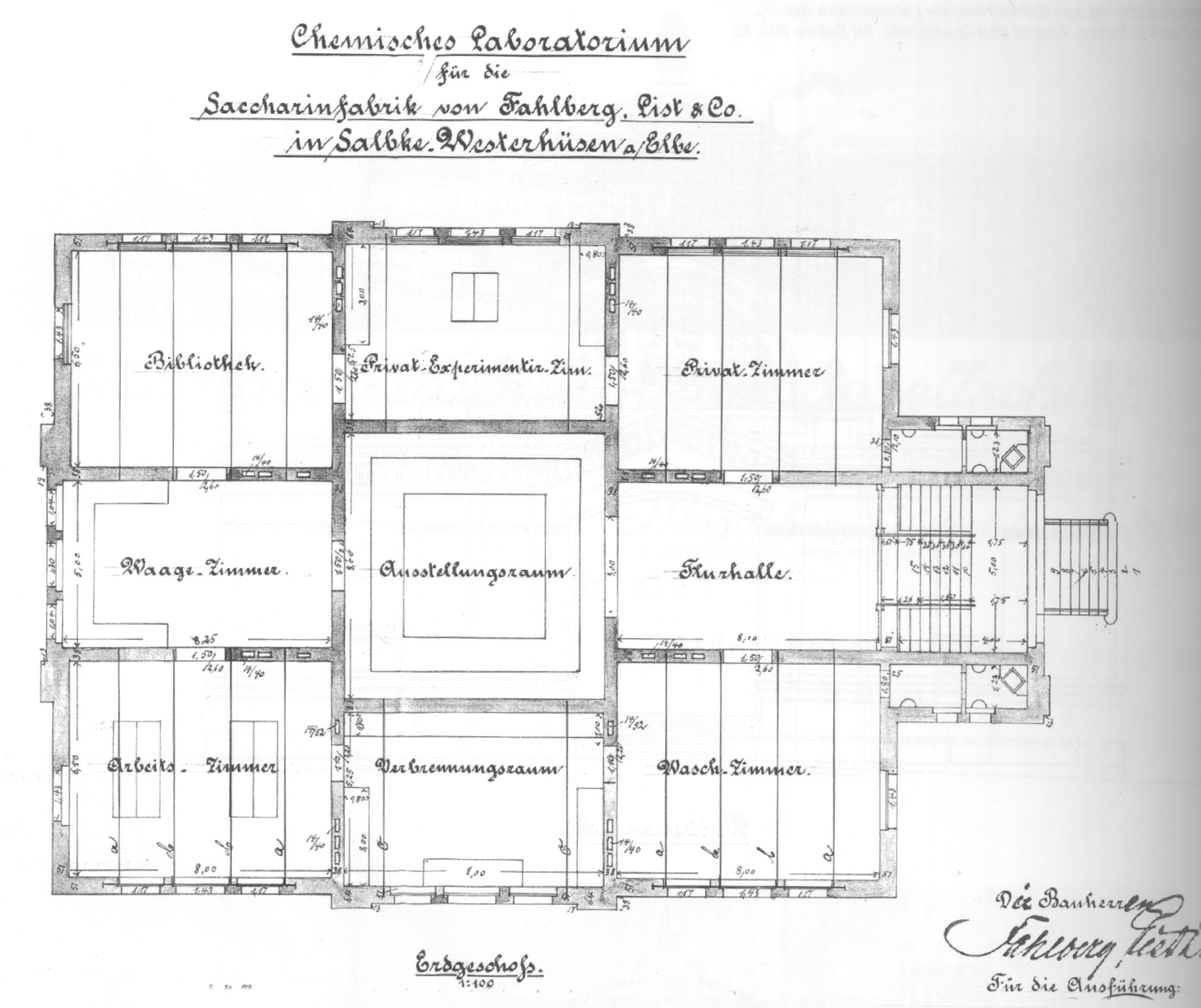 Grundriss des Laboratoriums von Fahlberg-List, Alt Salbke 60-63, Magdeburg